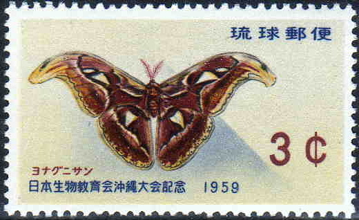 米軍占領下の沖縄で郵便事業を行っていた琉球郵便が発行した日本生物教育会沖縄大会記念の切手。描かれているのはヨナグニサンである。